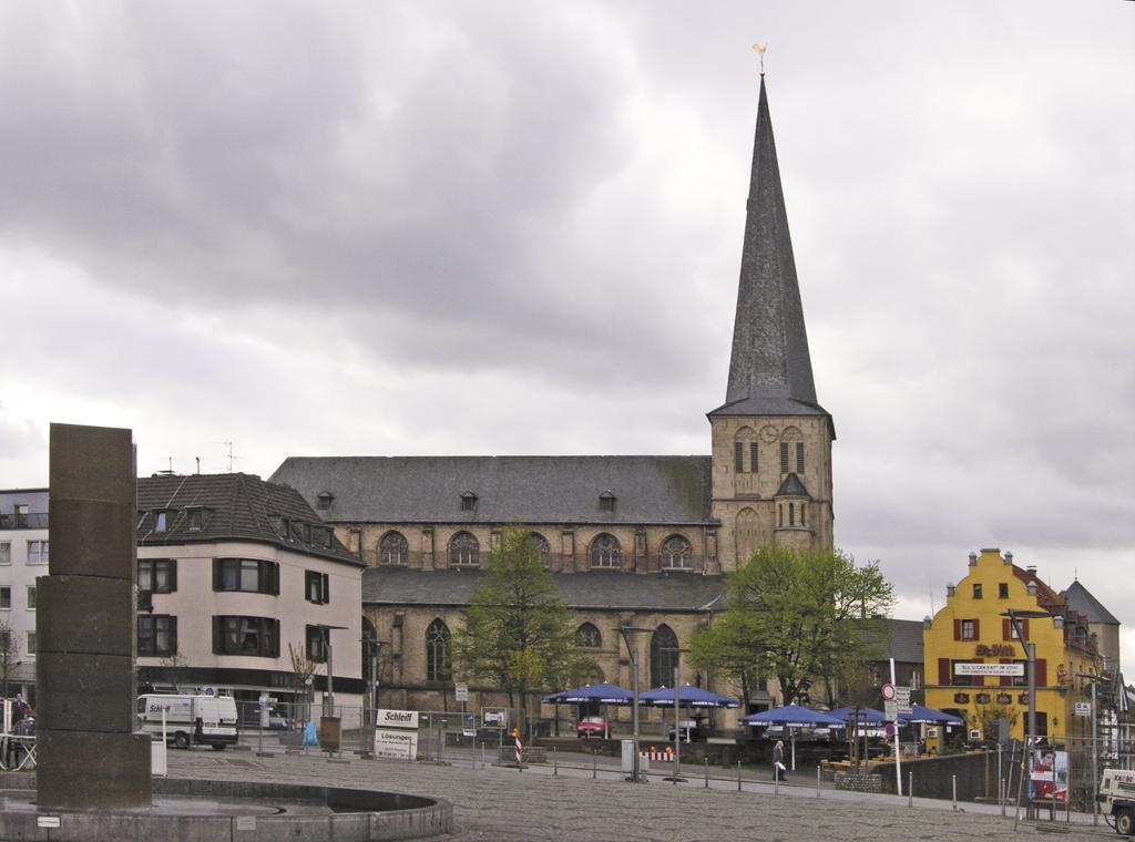 Mönchengladbach, St. Maria Himmelfahrt vom Markt aus gesehen